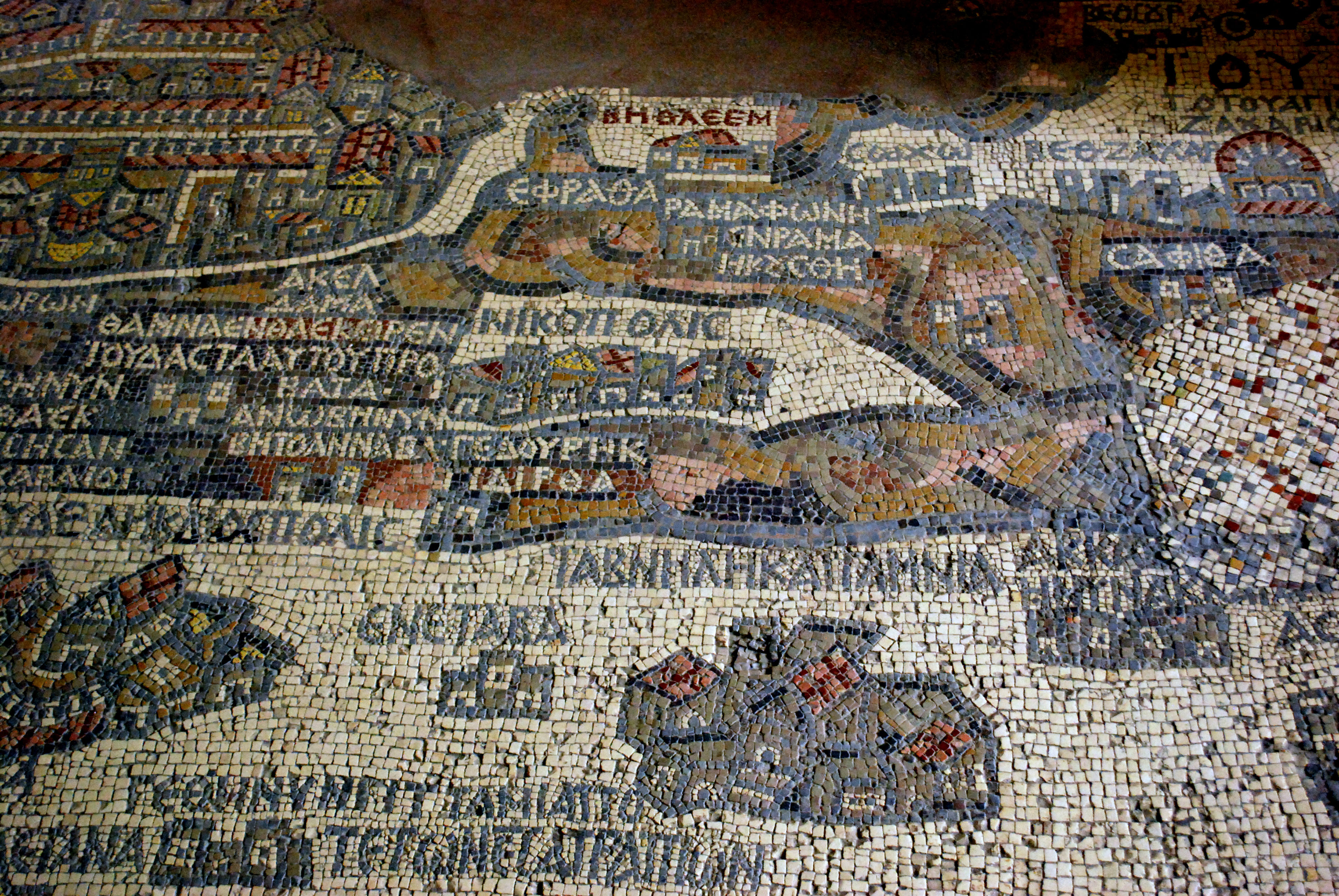 La carte de la Palestine, mosaïque du VIe siècle dans l'église Saint-Georges à Madaba (Jordanie) : détail de la zone au sud de Jérusalem.